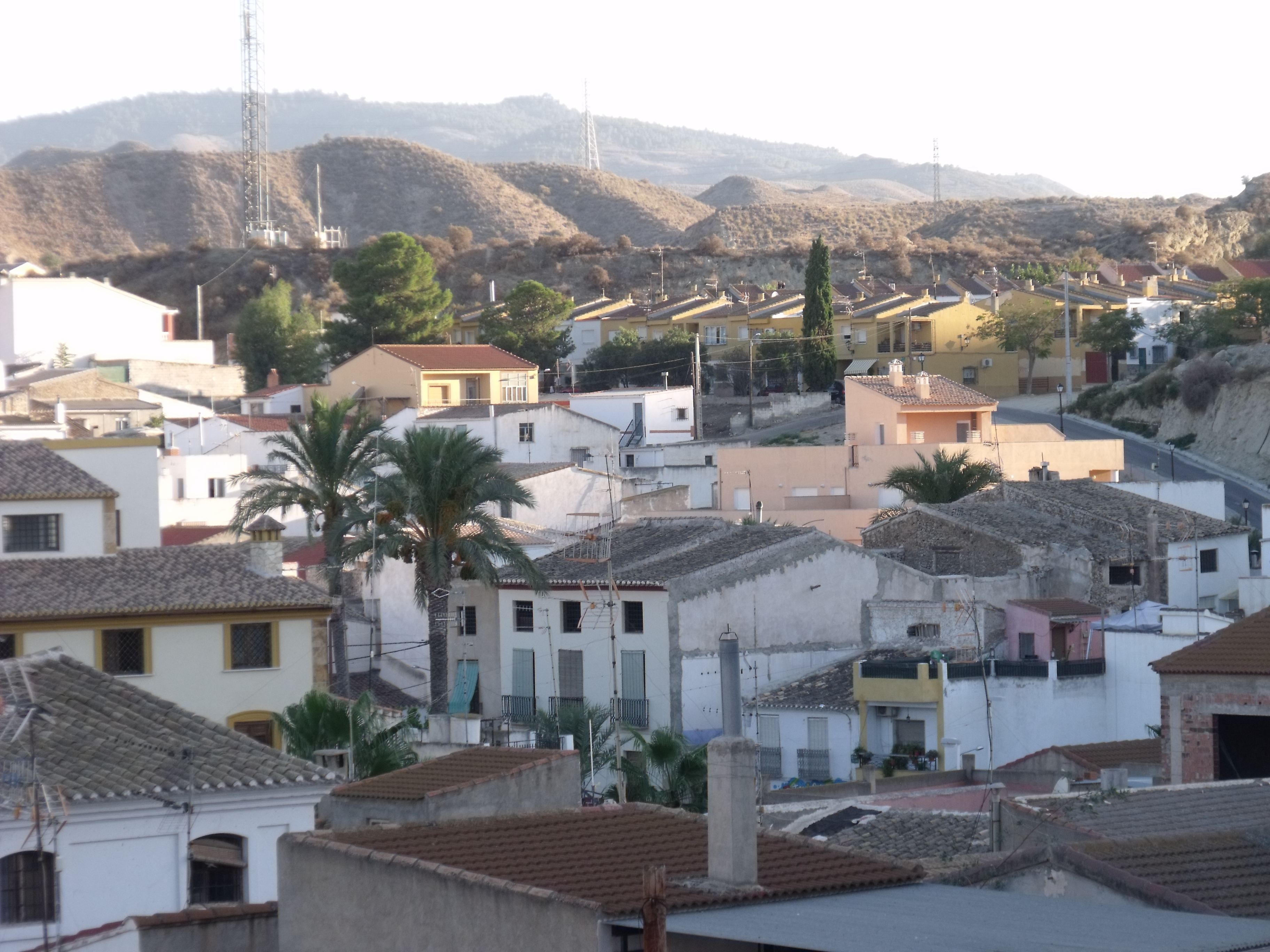 Vista general del pueblo